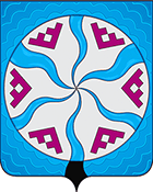 Герб Колгуевского сельсовета